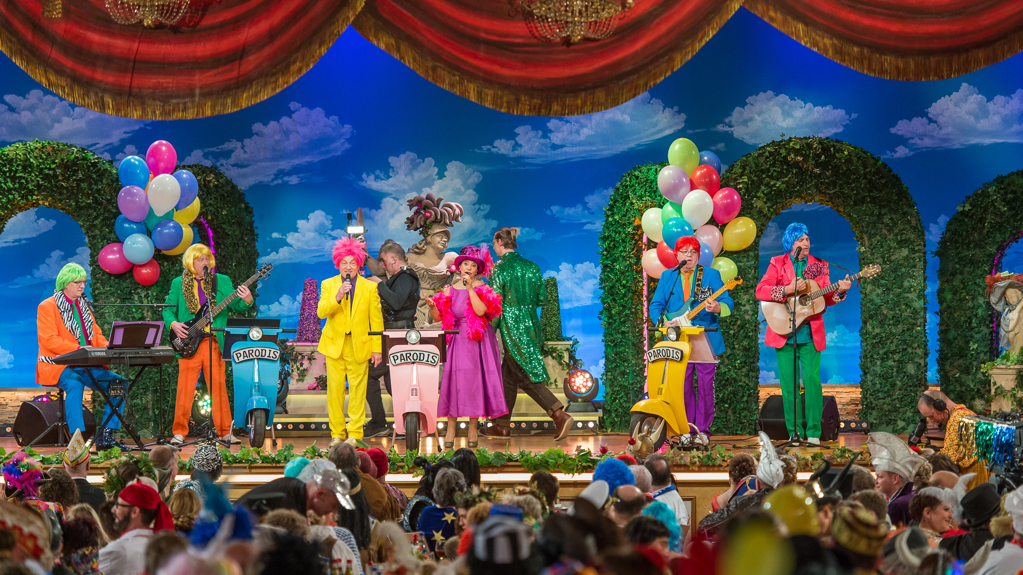 BR,Bayerisches Fernsehen,Fastnacht in Franken,Fastnachts-Verband Franken,Karneval,Live-Sendung,Mainfrankensäle,Parodis